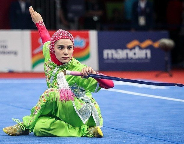 زهرا کیانی در مسابقات ووشو تالو، بازی‌های آسیایی ۲۰۱۸